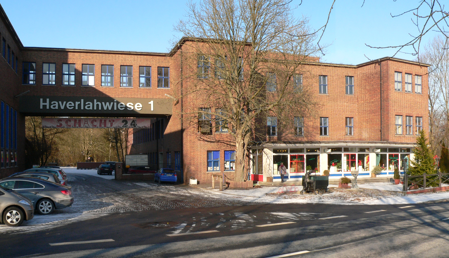 Bergwerksgebäude Haverlahwiese